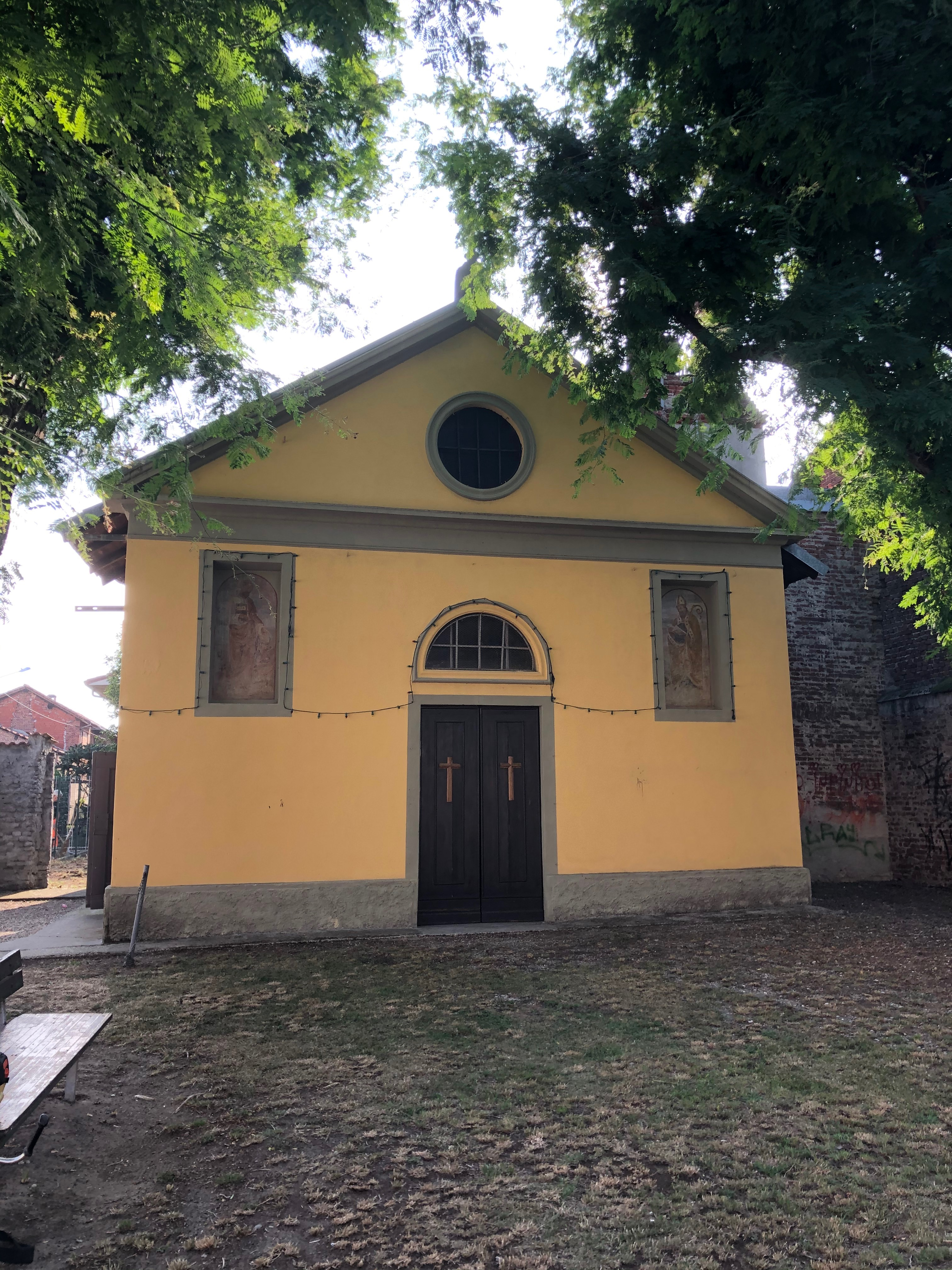 Facciata della chiesa della Beata Vergine Maria a Cilavegna